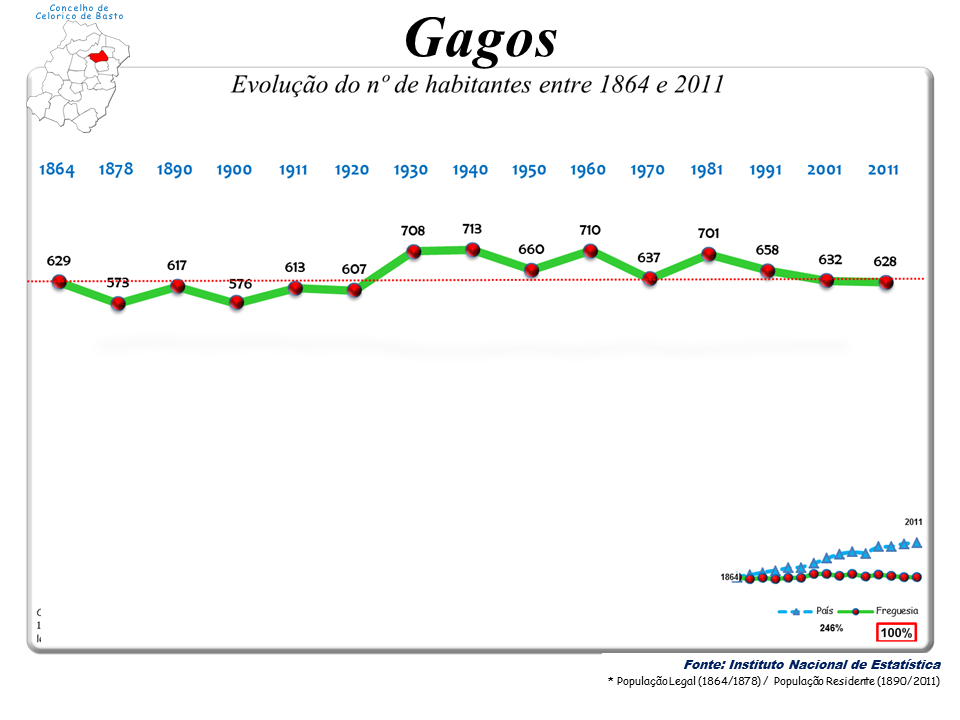 Censos 1864/2011